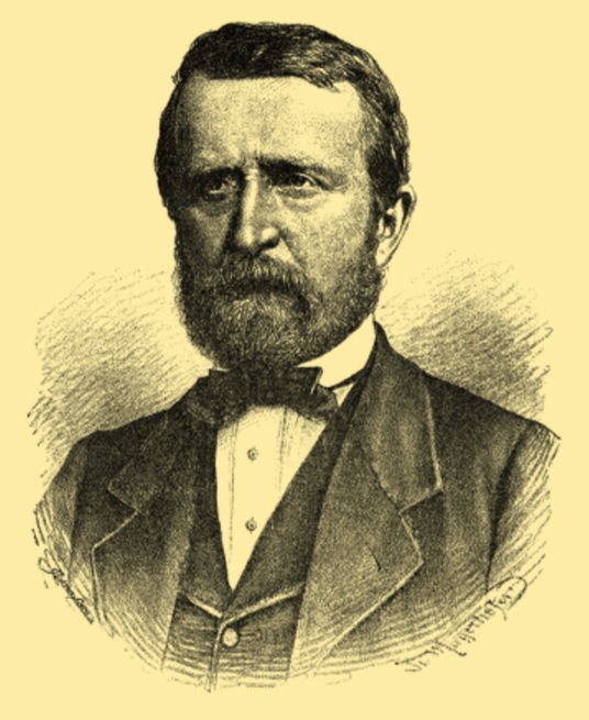 C. k. horní rada Augustin Jindřich Beer cca 1875